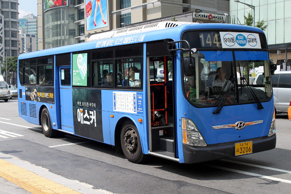 삼양교통 144번